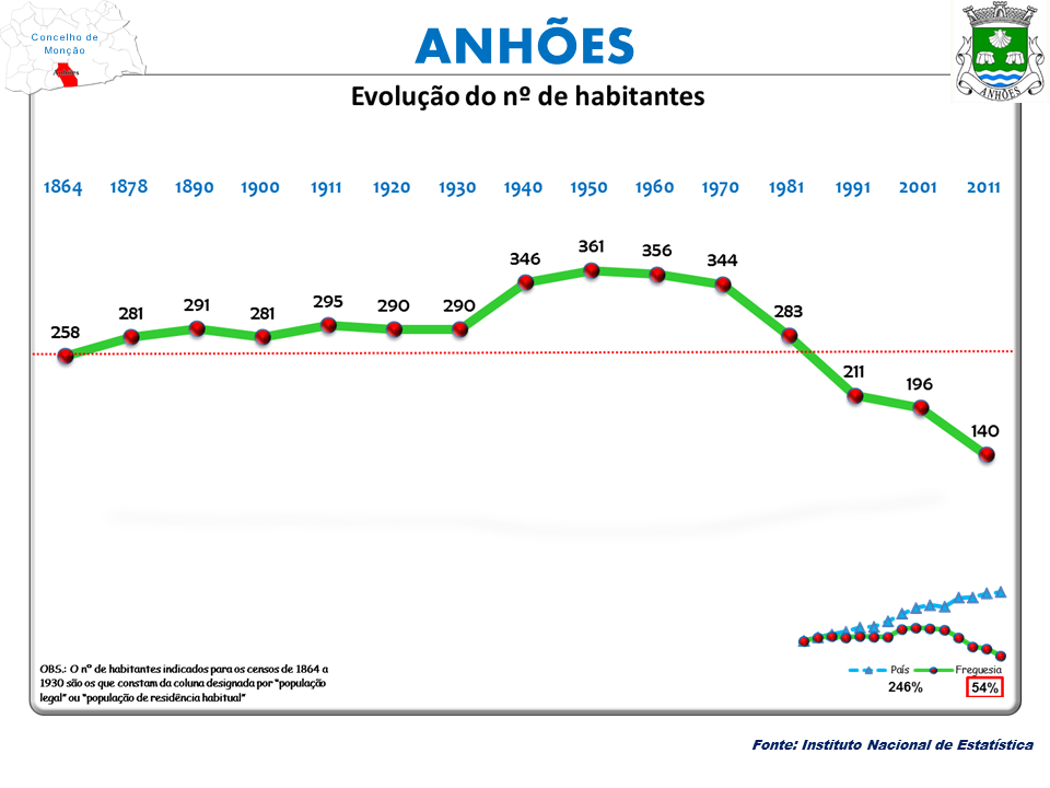 Censos 1864/2011